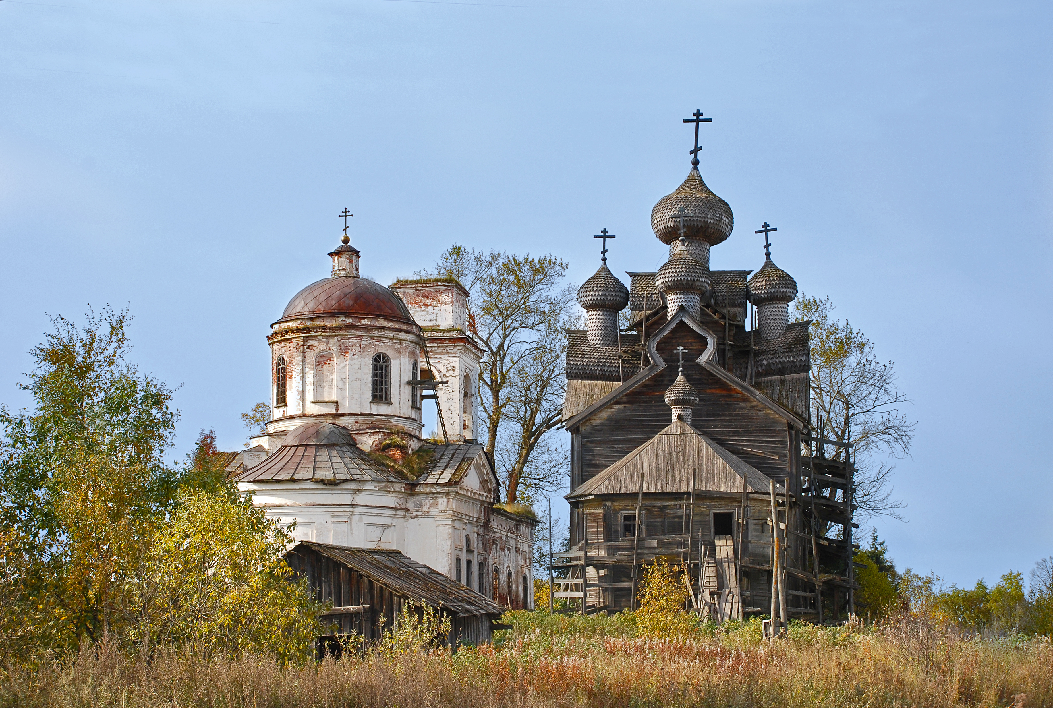 Храмовый комплекс (Вологодская область, Вытегра, село Палтога)